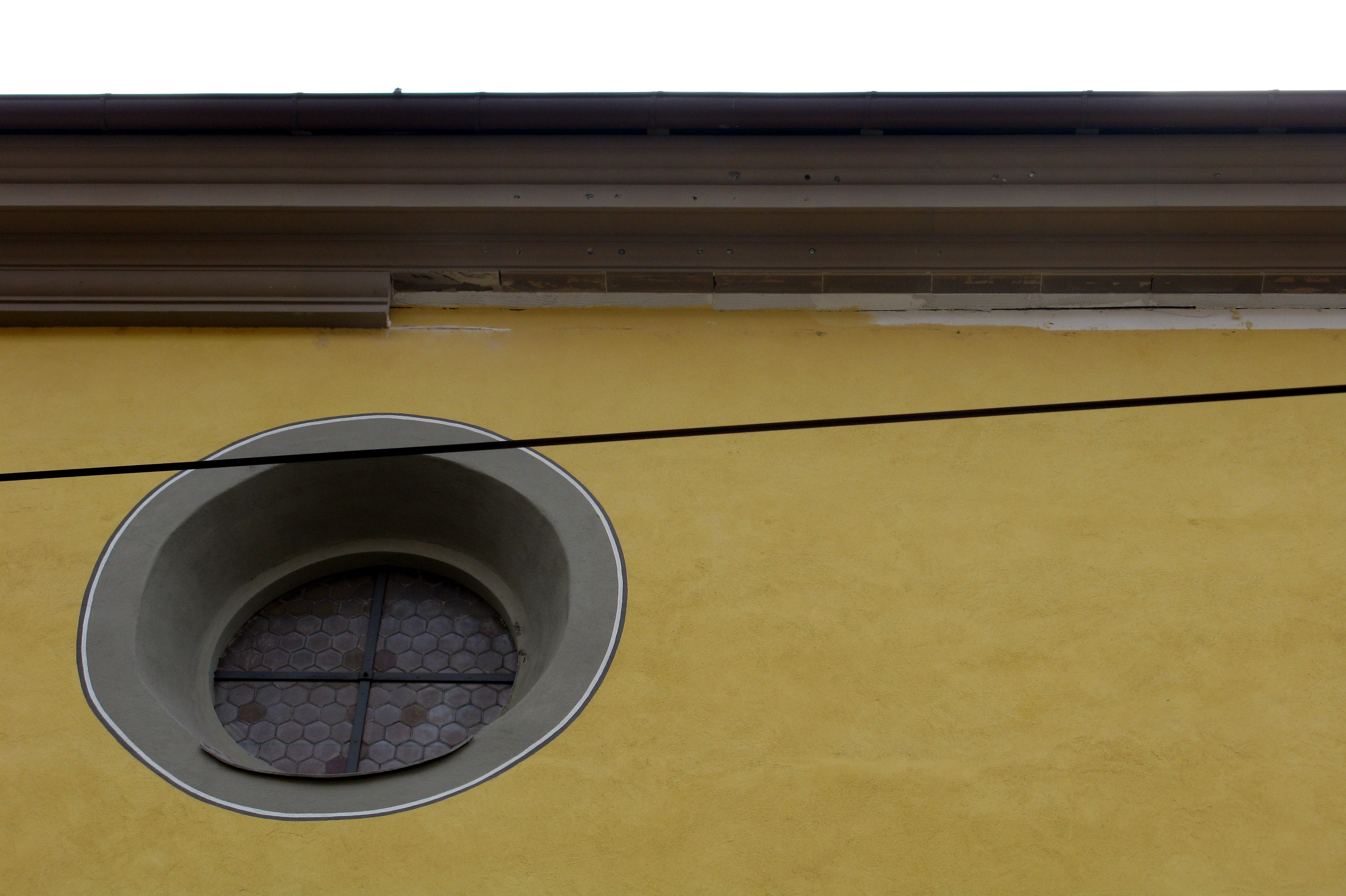 Augustinermuseum in Freiburg, herabgefallene Fassadenteile